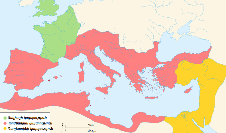 Հռոմեական կայսրությունը մ.թ.ա. 271 թվականին